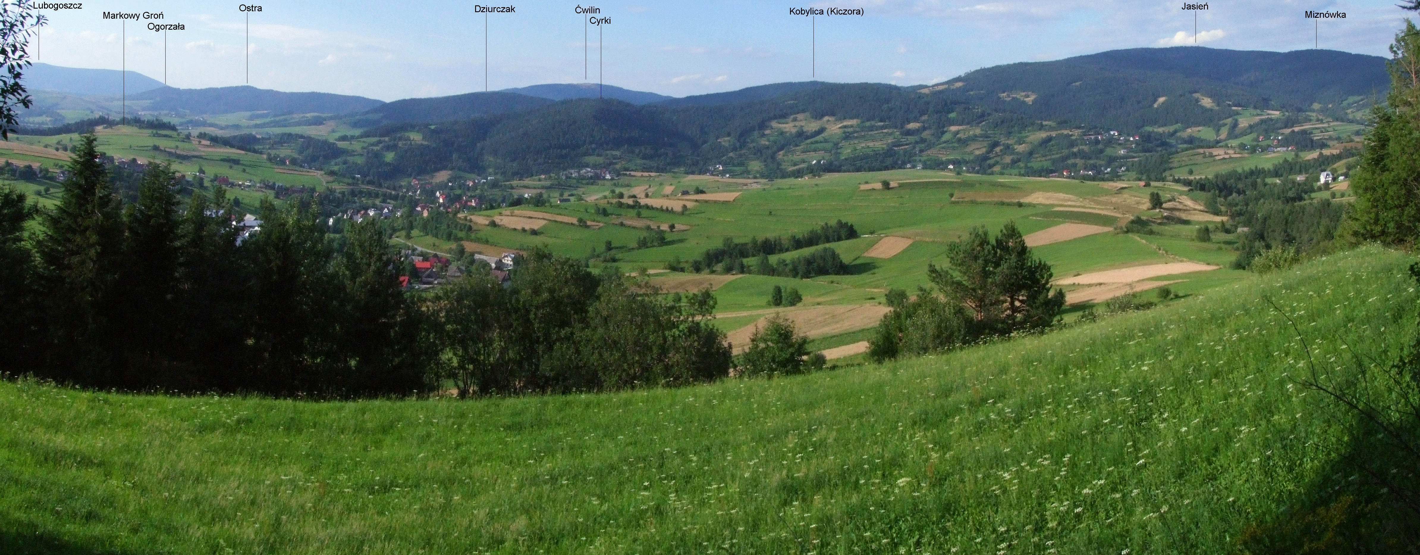 Panorama Lubomierza i widok na Beskid Wyspowy (z czarnego szlaku przez polanę Jastrzębie)